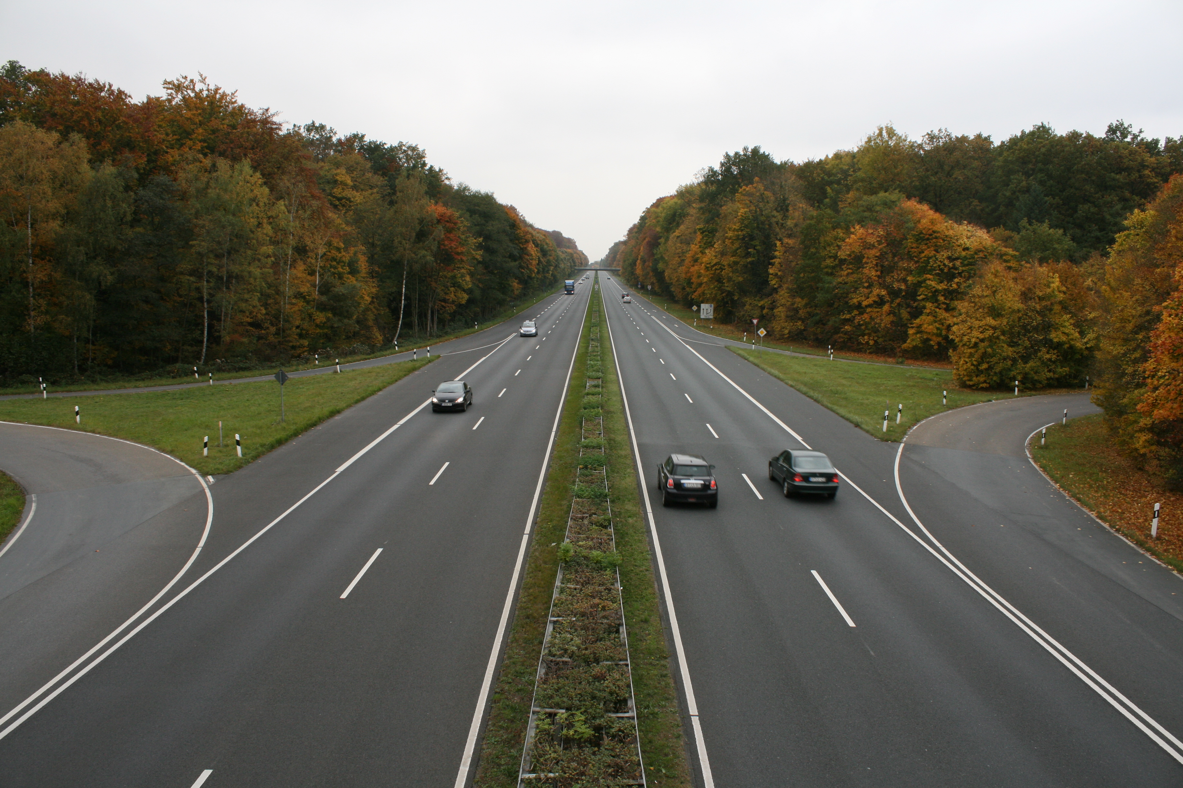 Die Babenhäuser Landstraße (B3) in Frankfurt am Main